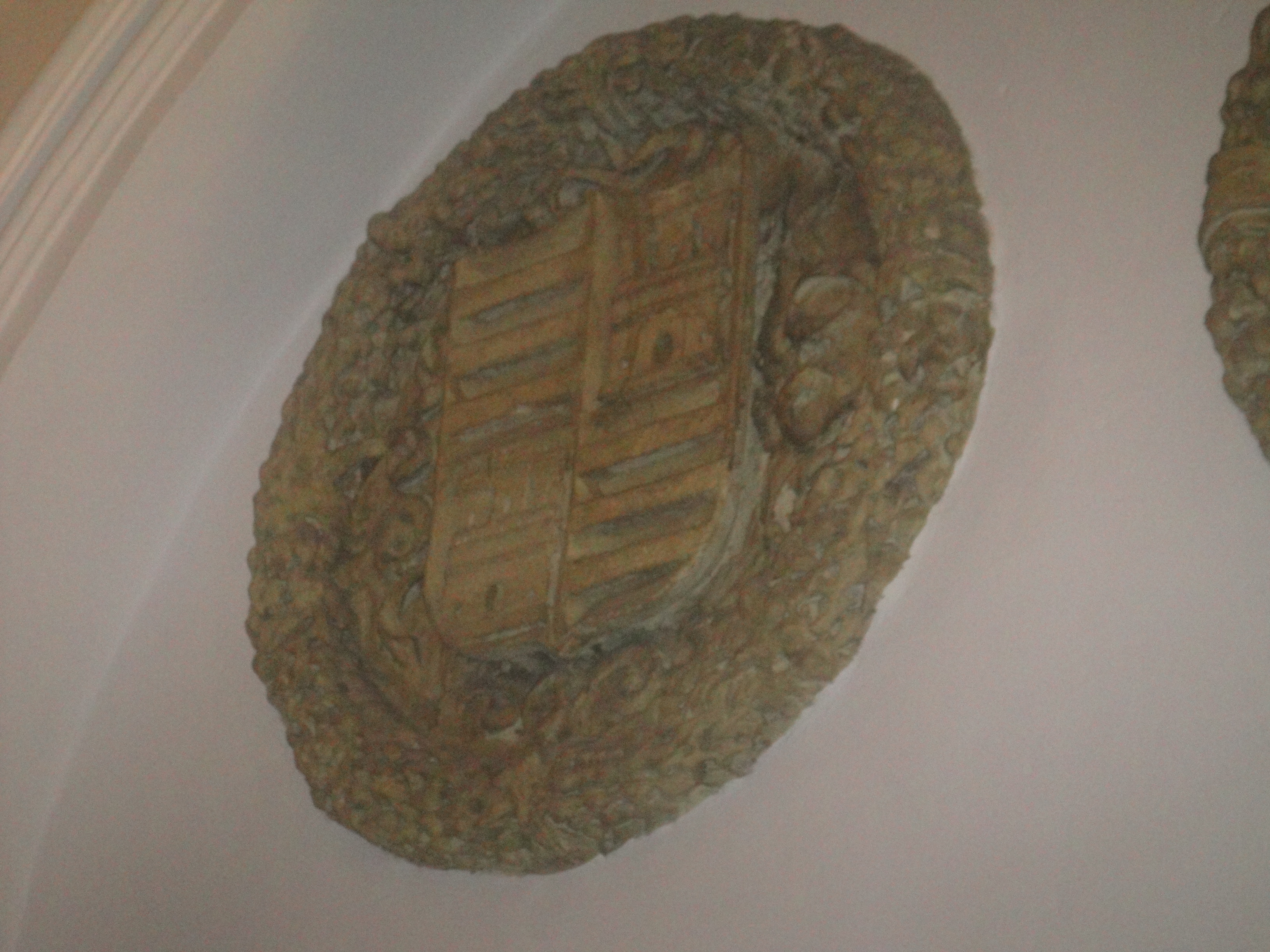 Escudo de armas en la iglesia de San Hipólito de Córdoba, provincia de Córdoba, (España).